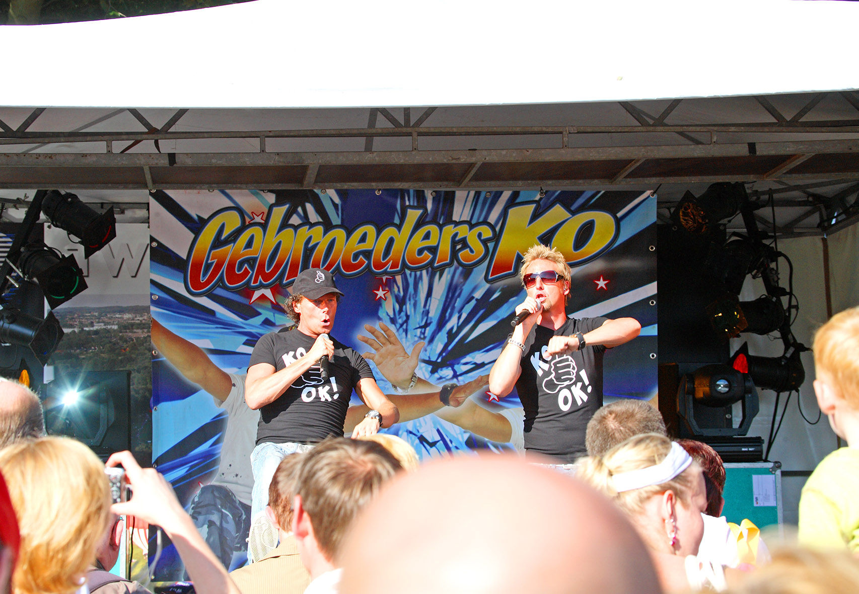 De Gebroeders Ko in 2008 op Twente Ballooning